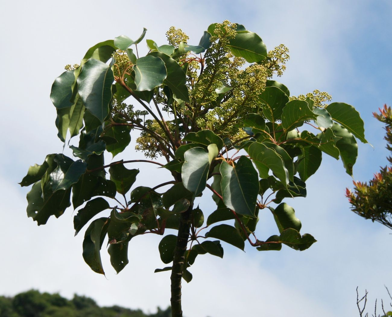 Schefflera rodriguesiana, Araliengewächse (Araliaceae) - Costa Rica: Prov. Alajuela, Parque Nacional Volcán Poás, 2550-2600 m